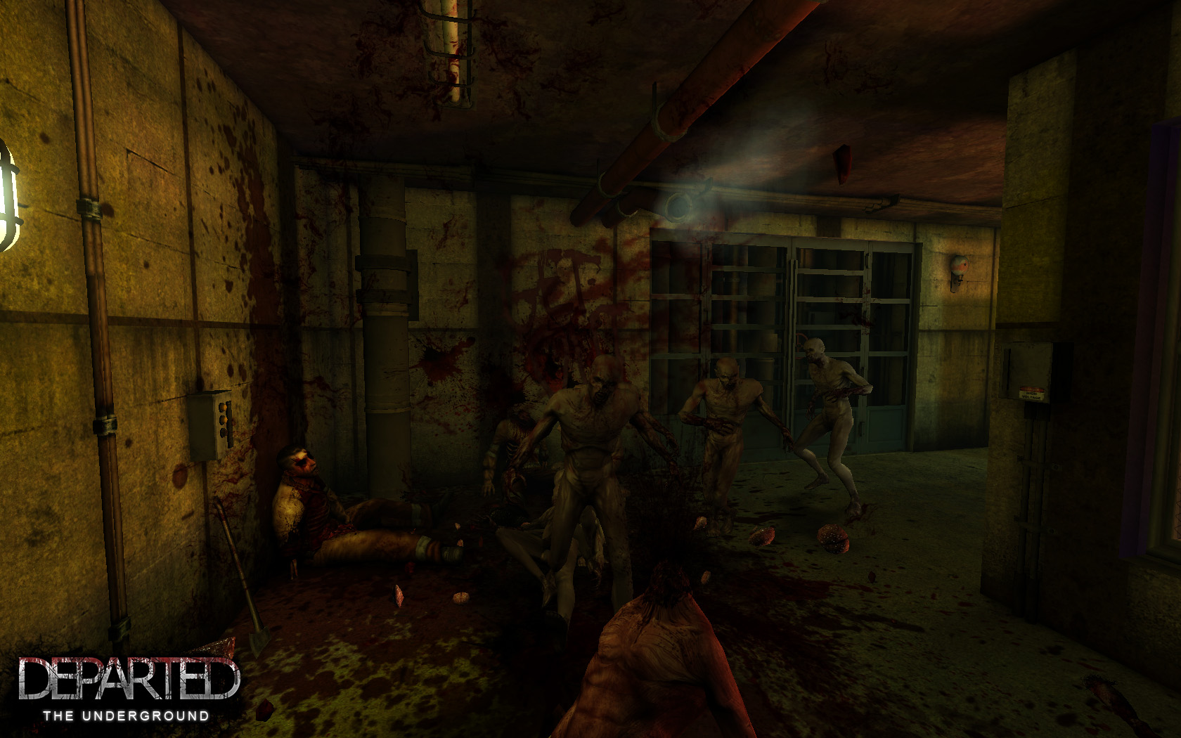 Action du jeu vidéo Killing Floor